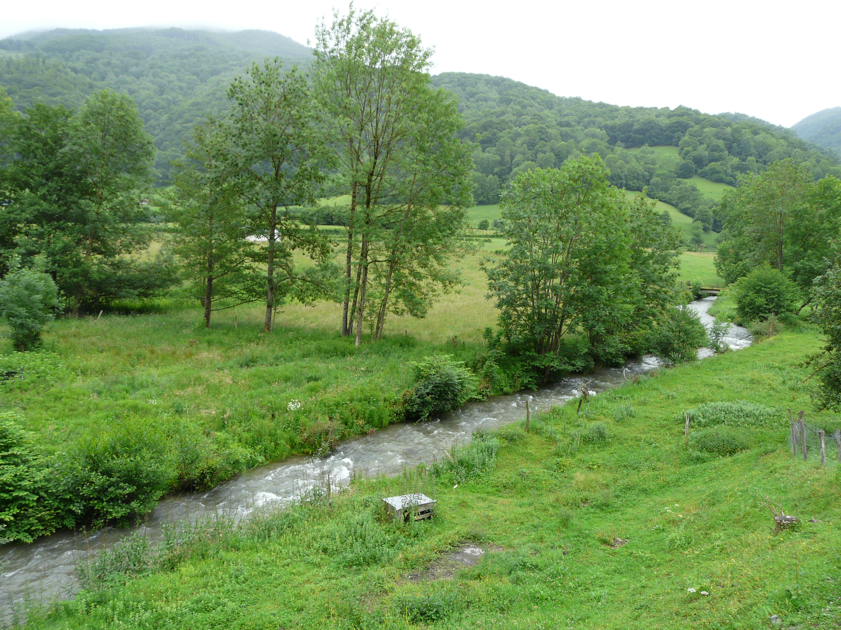 L'Ourse de Sost au nord-nord-est du village de Sost, Hautes-Pyrénées, France. Vue prise en direction de l'aval.